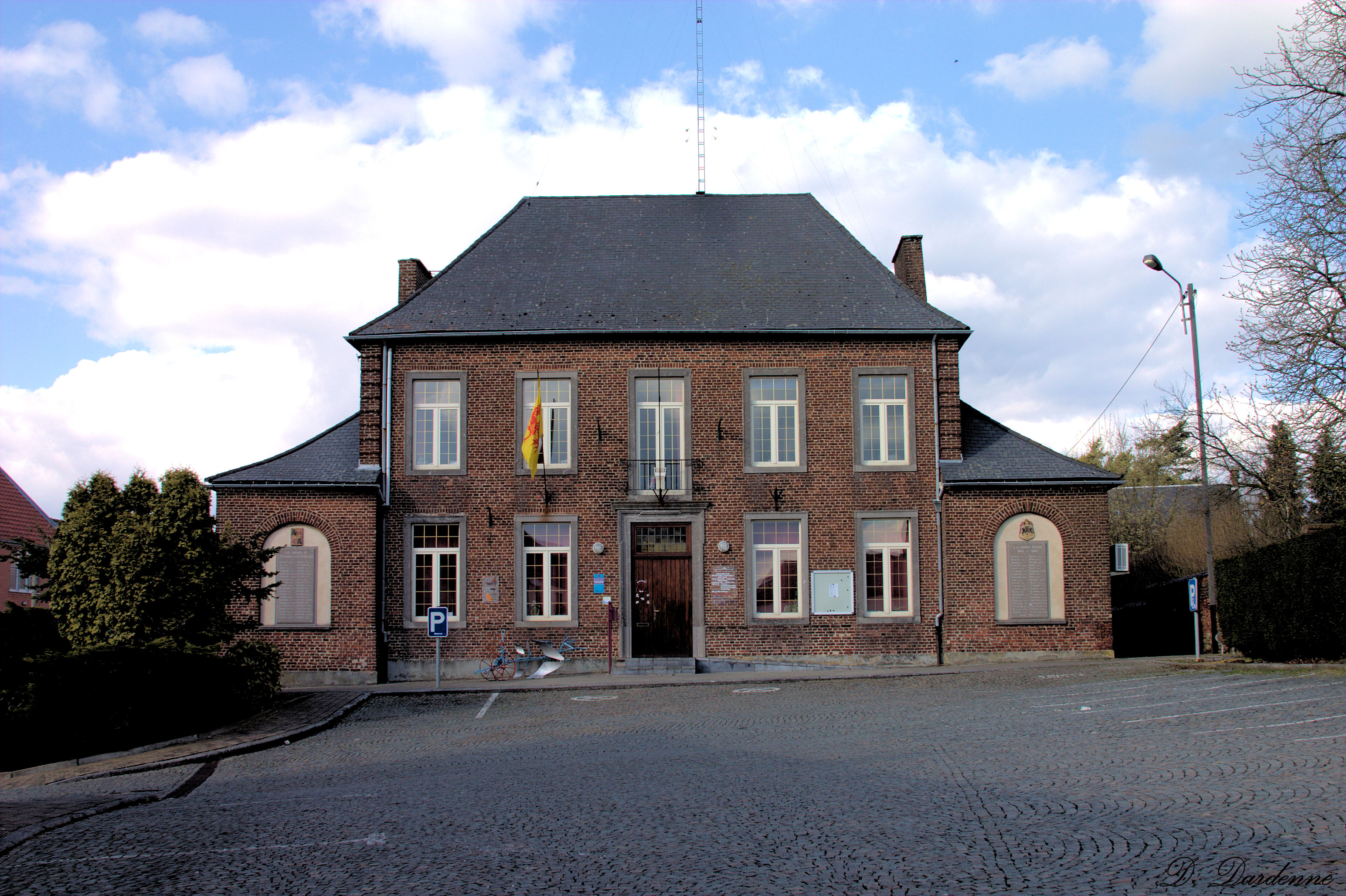 Hotel de Ville - Frasnes-Lez-Gosselies